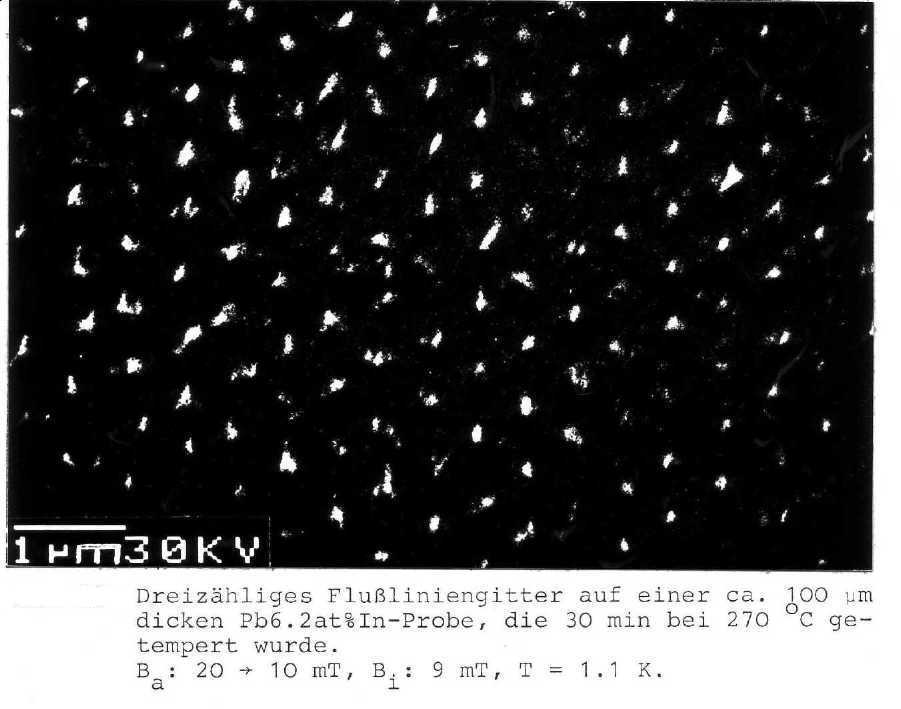 Flusslinienverteilung in PbIn